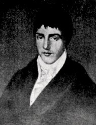 Scan eines alten Gemäldeporträts von William Cockerill, der Jüngere